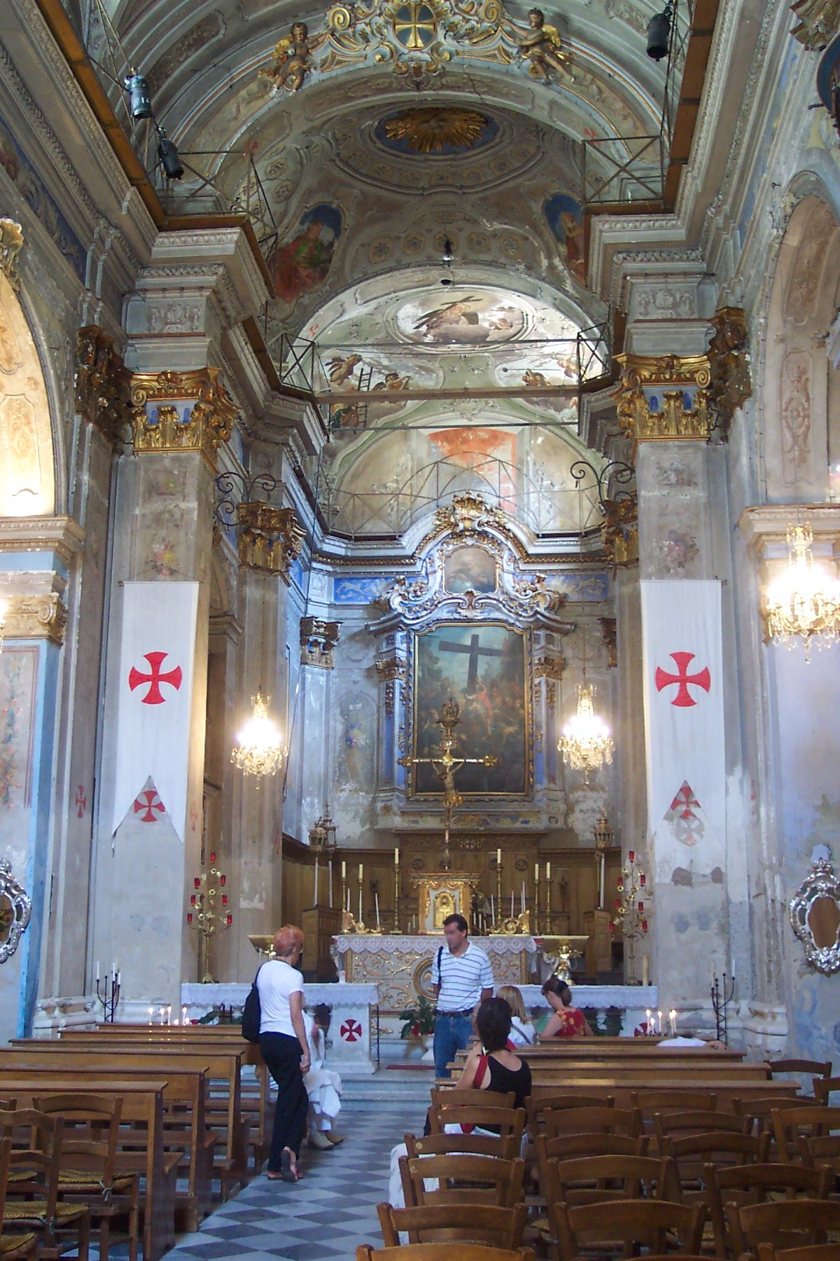 Interieur de l'église Sainte-Croix. Ses ouvertures sont exceptionnelles.